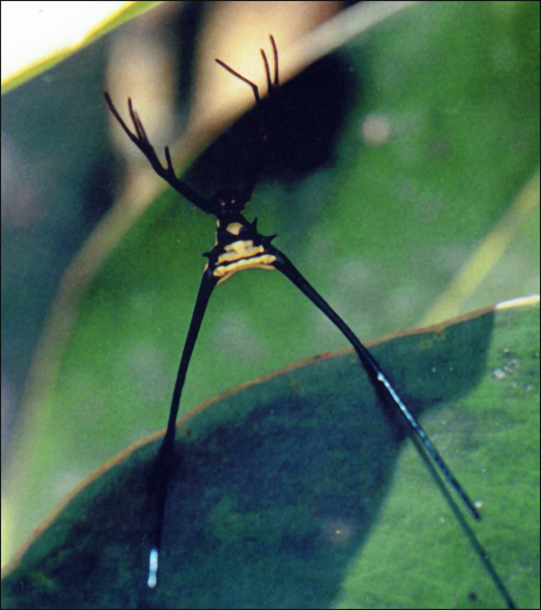 Micrathena cyanospina, vue dorsale totale